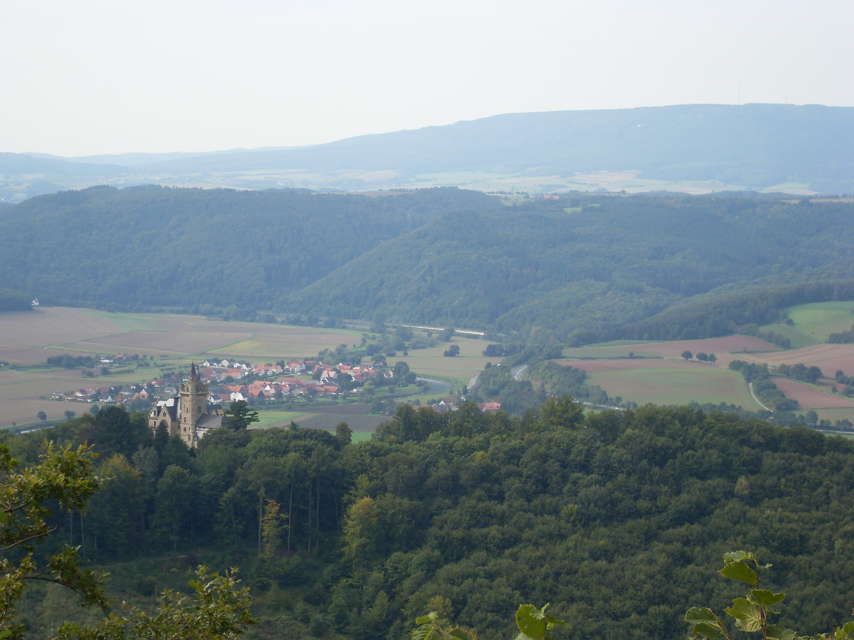 Schloss Rothestein, dahinter Kleinvach und Weiden an der Werra, das südliche Soodener Bergland und im Hintergrund der Hohe Meißner (Kamerastandort vermutlich am Schwengelberg)